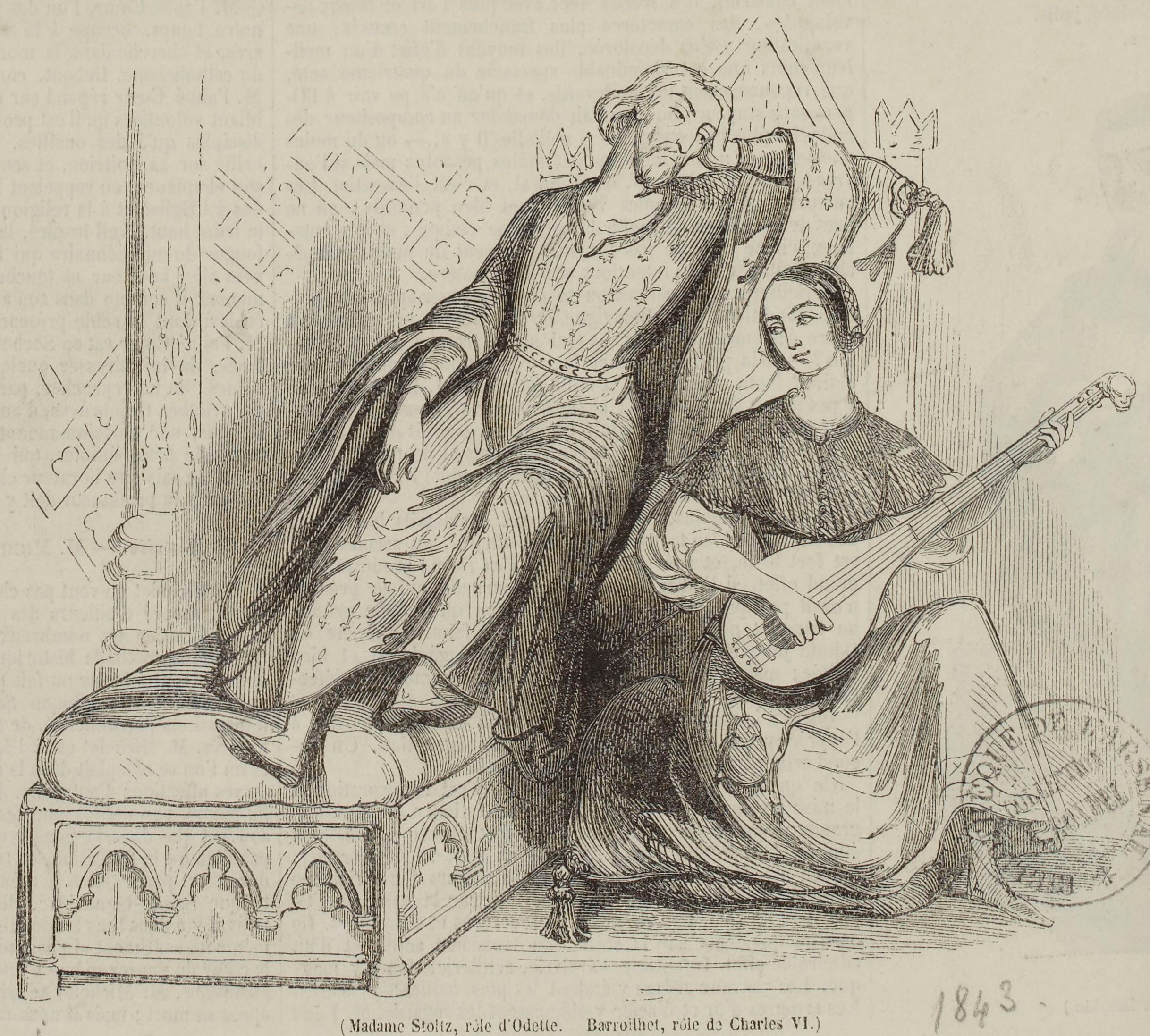 Berceuse d'Odette à l'acte IV de Charles VI, opéra de J.F. Halévy, avec R. Stoltz dans le rôle d'Odette et P. Barroilhet dans celui de Charles VI